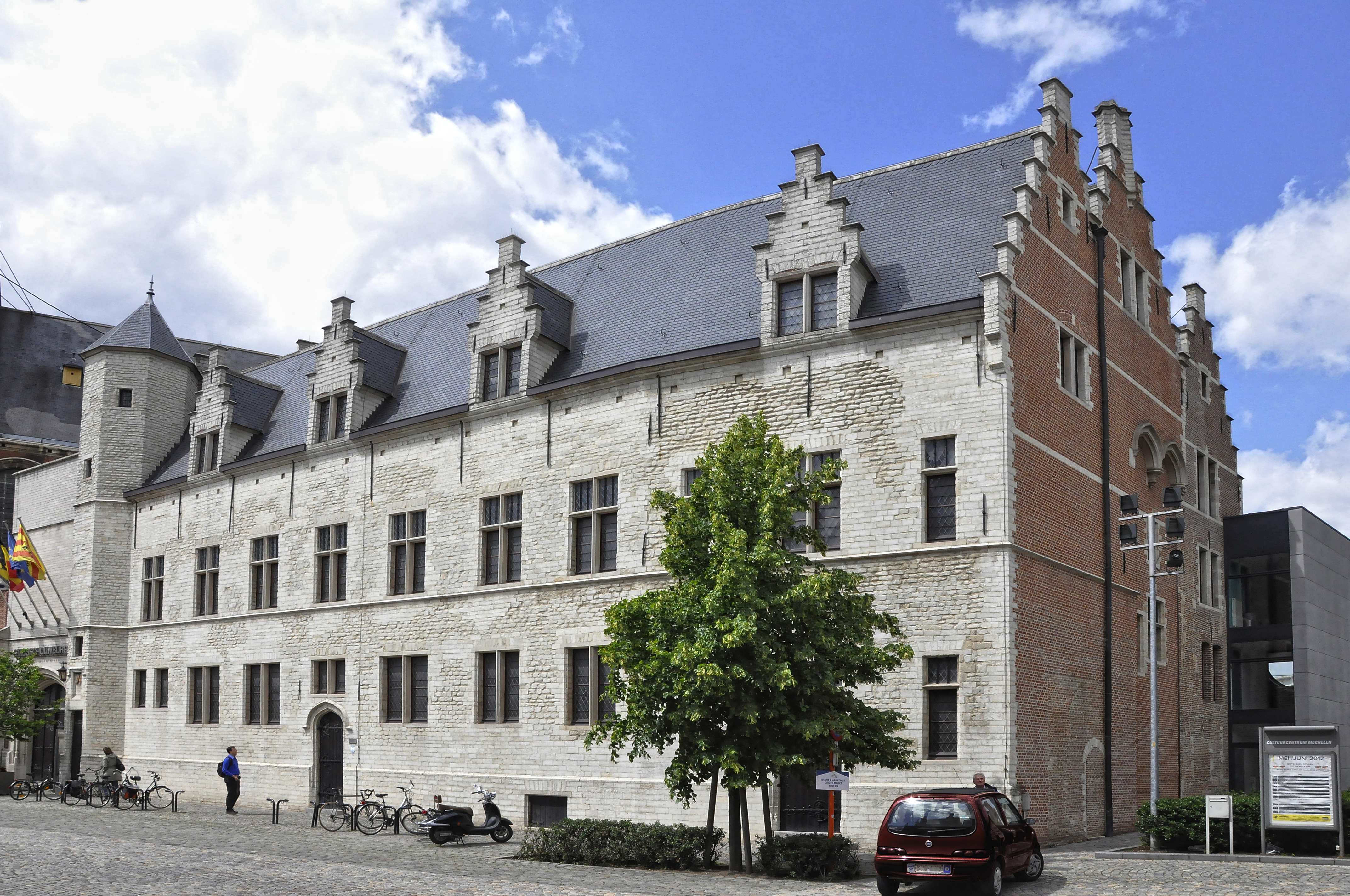 Het Hof van Kamerijk, ook het paleis van Margaretha van York, of het Keizershof genoemd, te Mechelen, België